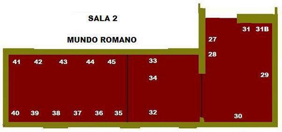 Distribución de los cuadros en la sala 2, dedicada al mundo romano en el Museo Ulpiano Checa, Xolmenar de Oreja, Comunidad de Madrid , España